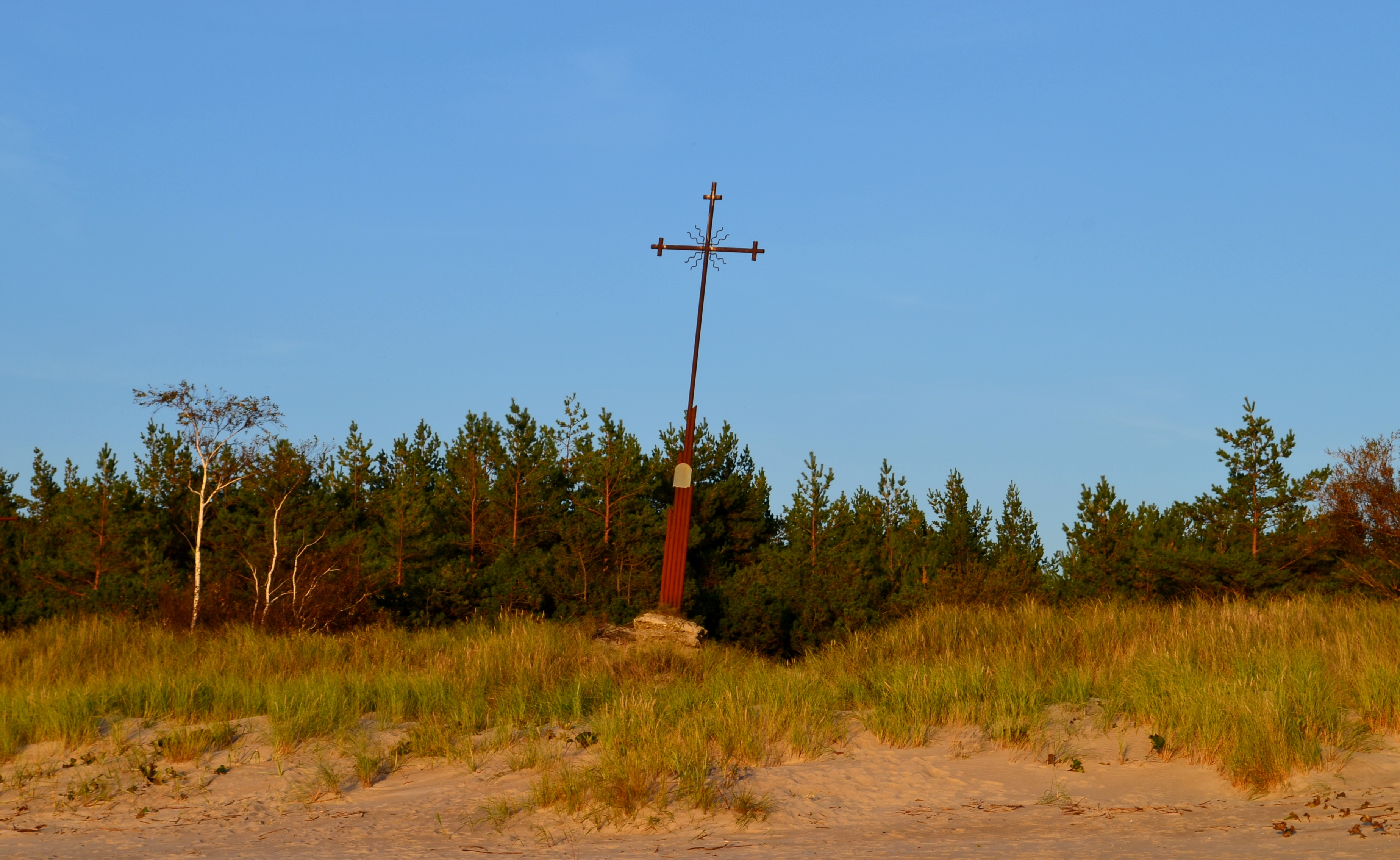 Kryžius jūros pakrantėje šalia Melnragės (Klaipėda)